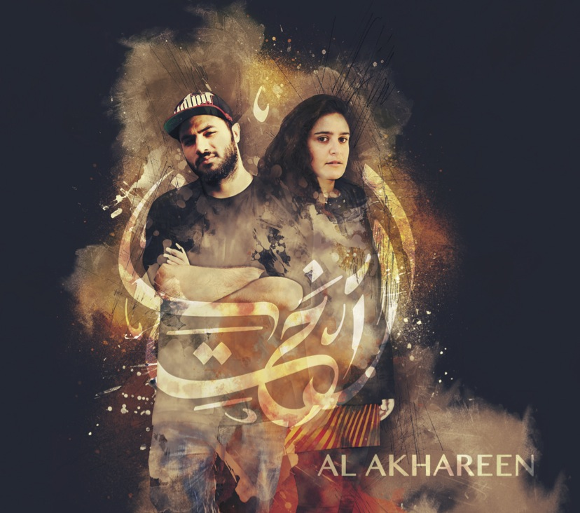 Al Akhareen - Osloob & Naïssam Jalal (2018 - Les couleurs du son)